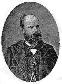 Mayor general Carlos Roloff